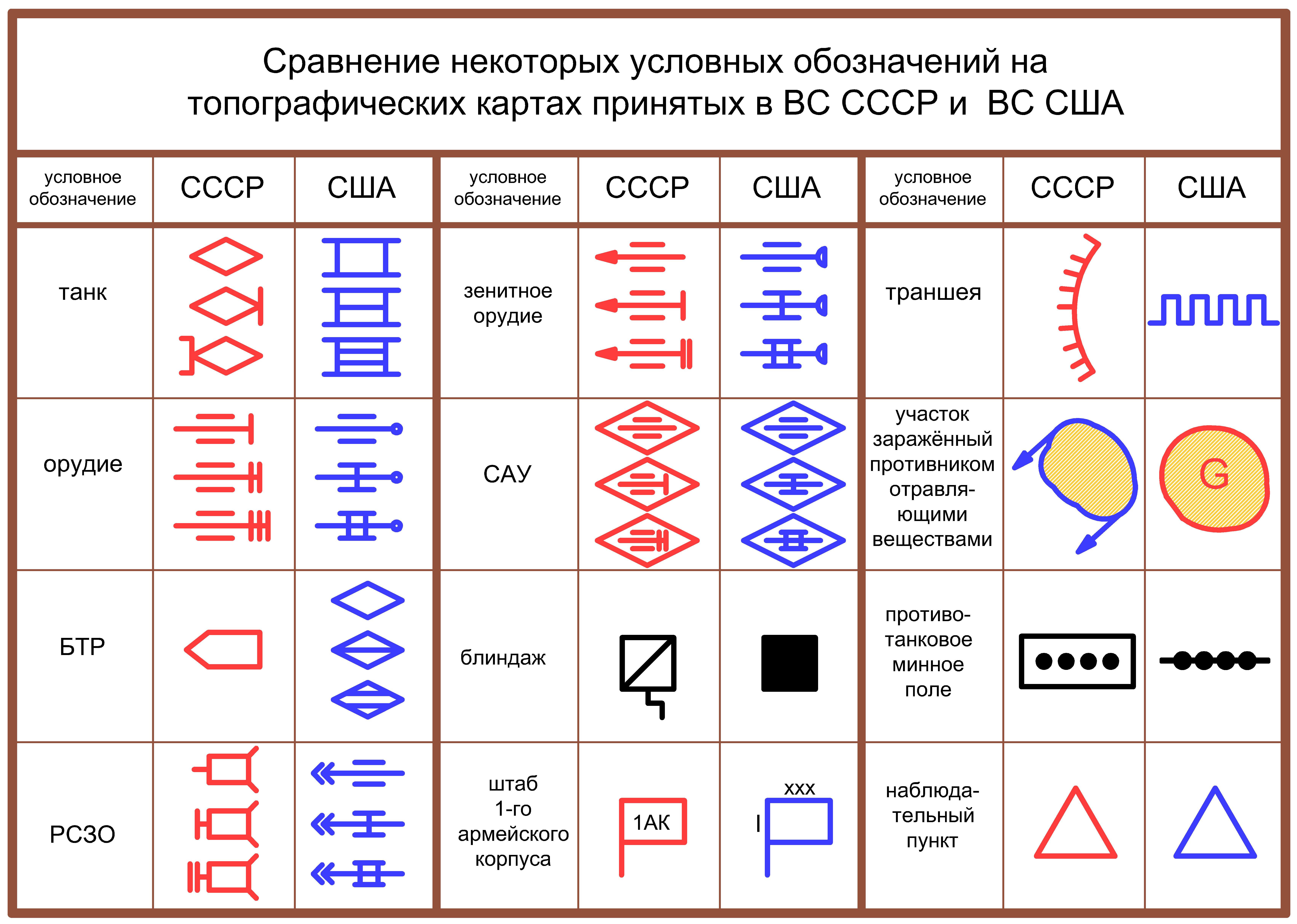 Сравнение некоторых условных обозначений ВС СССР и ВС США на топографических картах